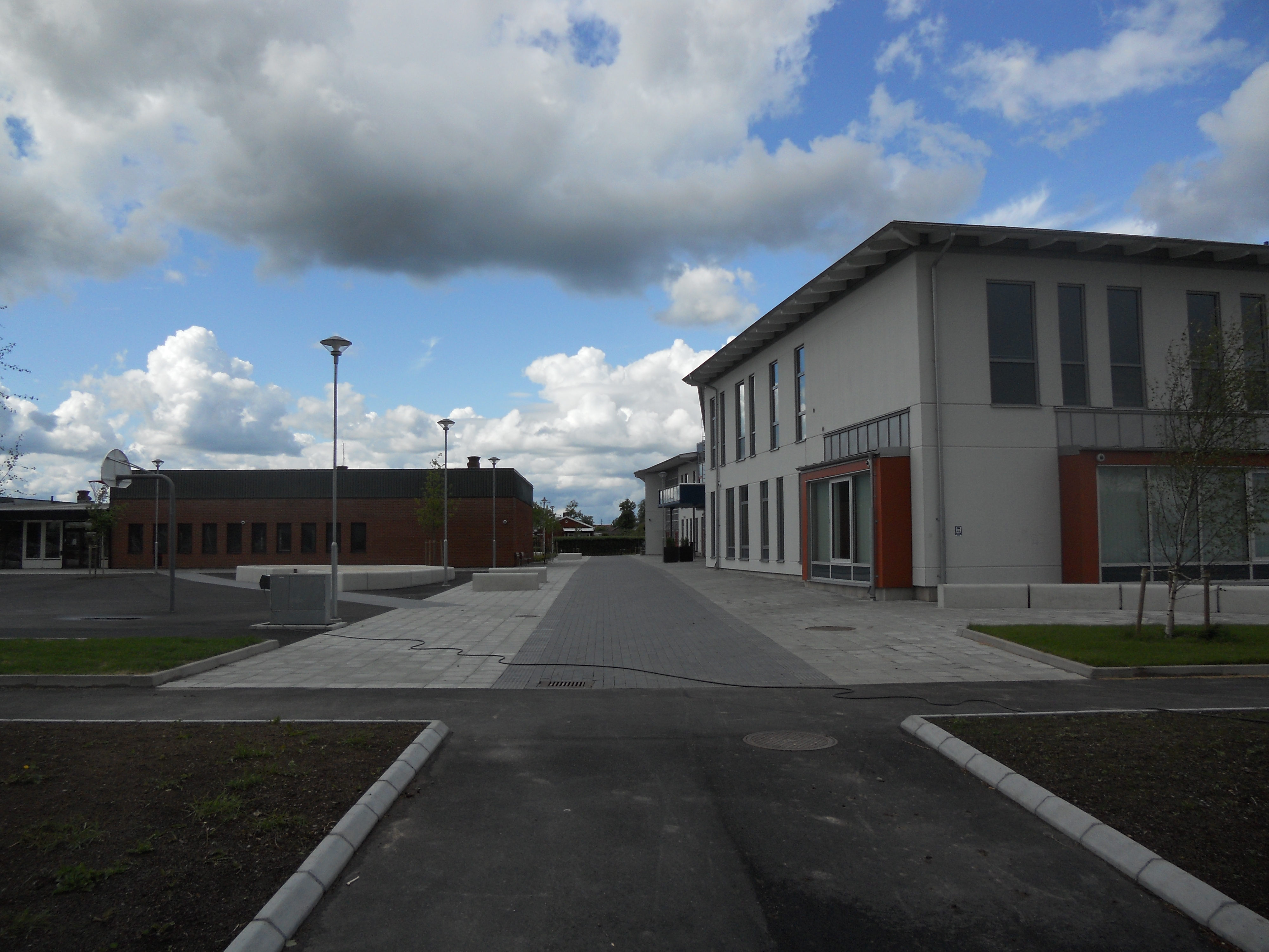 Torpaskolan i Vänersborg: nyare och äldre delar